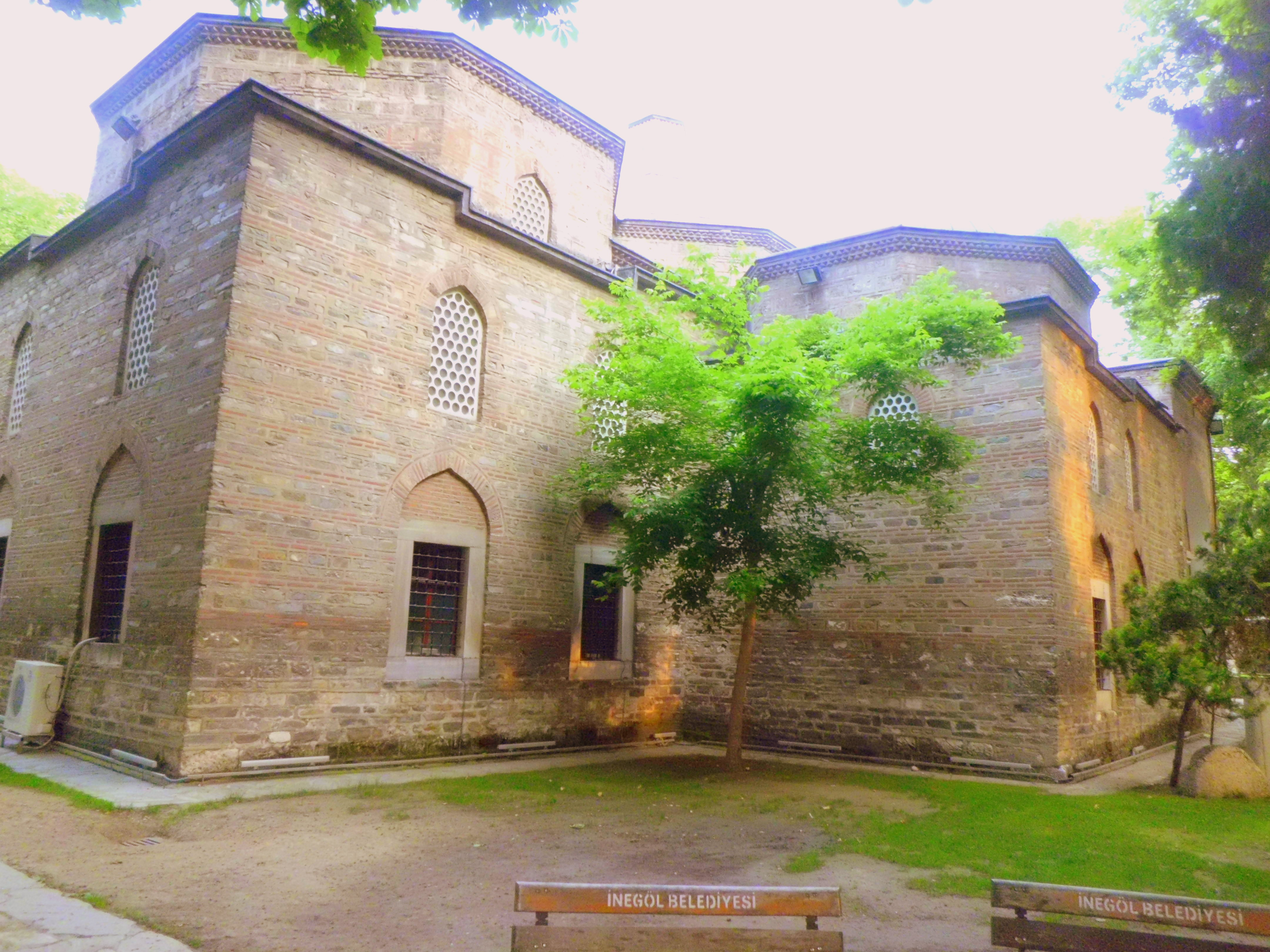 İnegöl'deki İshakpaşa Külliyesi.